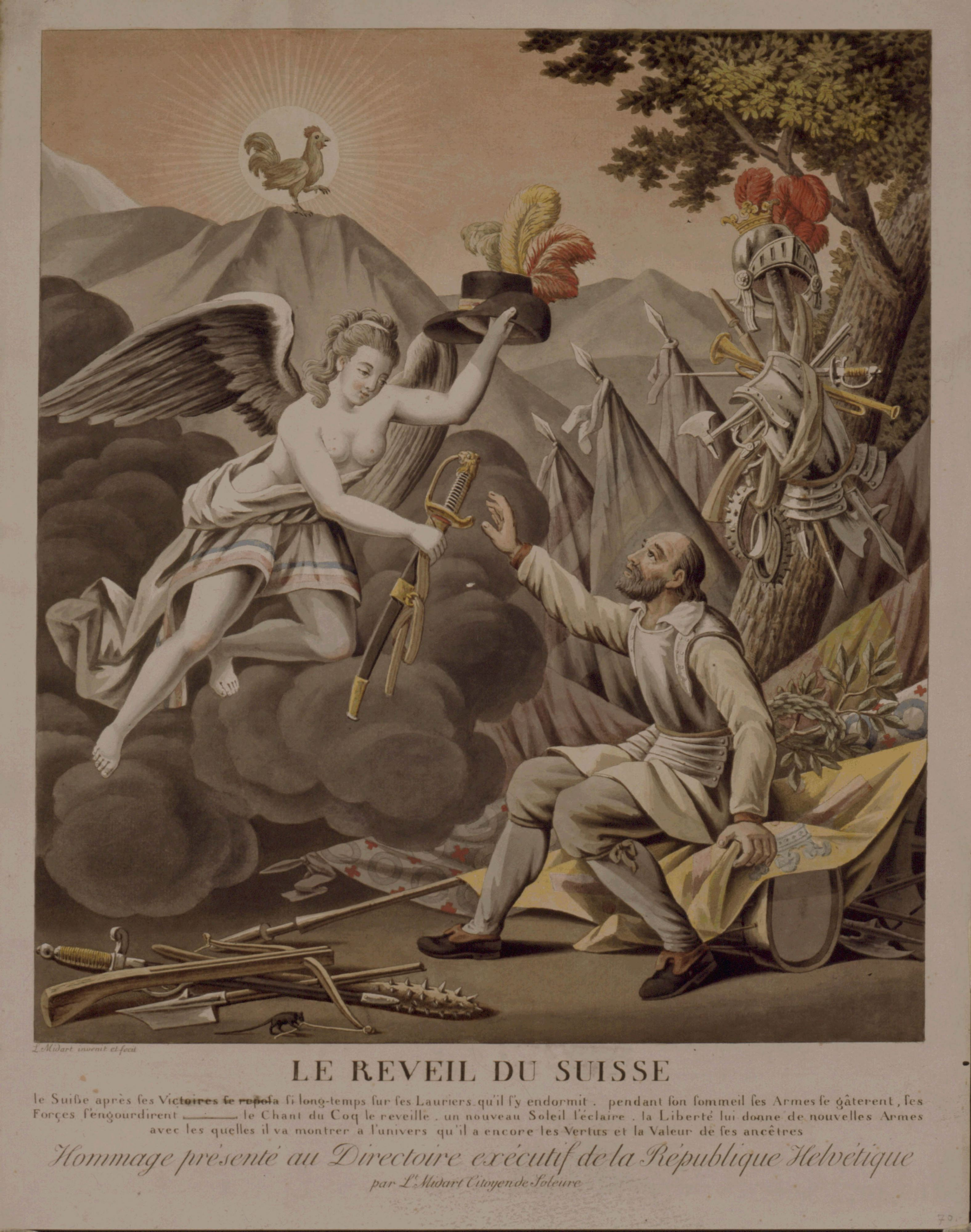 Laurent Louis Midart: Le Réveil du Suisse («Das Erwachen des Schweizers»), kolorierte Radierung, 1798, Kunstmuseum Solothurn. Text: Le Suisse après ses Victoires se reposa si long-temps sur ses Lauriers qu'il s'y endormit. pendant son sommeil ses Armes se gâterent, ses Forçes s'engourdirent – le Chant du Coq le reveille. un nouveau Soleil l'Eclaire. la Liberté lui donne de nouvelles Armes avec les quelles il va montrer a l'univers qu'il a encore les Vertus et la Valeur de ses ancêtres. («Nach seinen Siegen ruhte sich der Schweizer so lange auf seinen Lorbeeren aus, dass er darauf einschlief. Während seines Schlafs verdarben seine Waffen, seine Kräfte erstarrten – der Gesang des Hahns weckt ihn auf. Eine neue Sonne erleuchtet ihn, die Freiheit gibt ihm neue Waffen, mit denen er der ganzen Welt bald zeigen wird, dass er noch über die Tugenden und die Geltung seiner Vorfahren verfügt.») Das Bild preist die revolutionäre Umwandlung der Alten Eidgenossenschaft in die Helvetische Republik 1798. Es zeigt einen Schweizer in mittelalterlicher Tracht, der aus seinem Schlaf (Sinnbild der absolutistischen Missstände) erwacht und vom Genius der Freiheit seine Waffen gereicht bekommt. Die Hutfedern zeigen die Farben der Helvetischen Republik, der Gewandsaum des Genius die der Französischen Republik. Im Hintergrund verkünden eine aufgehende Sonne und der krähende gallische Hahn die neue Zeit.